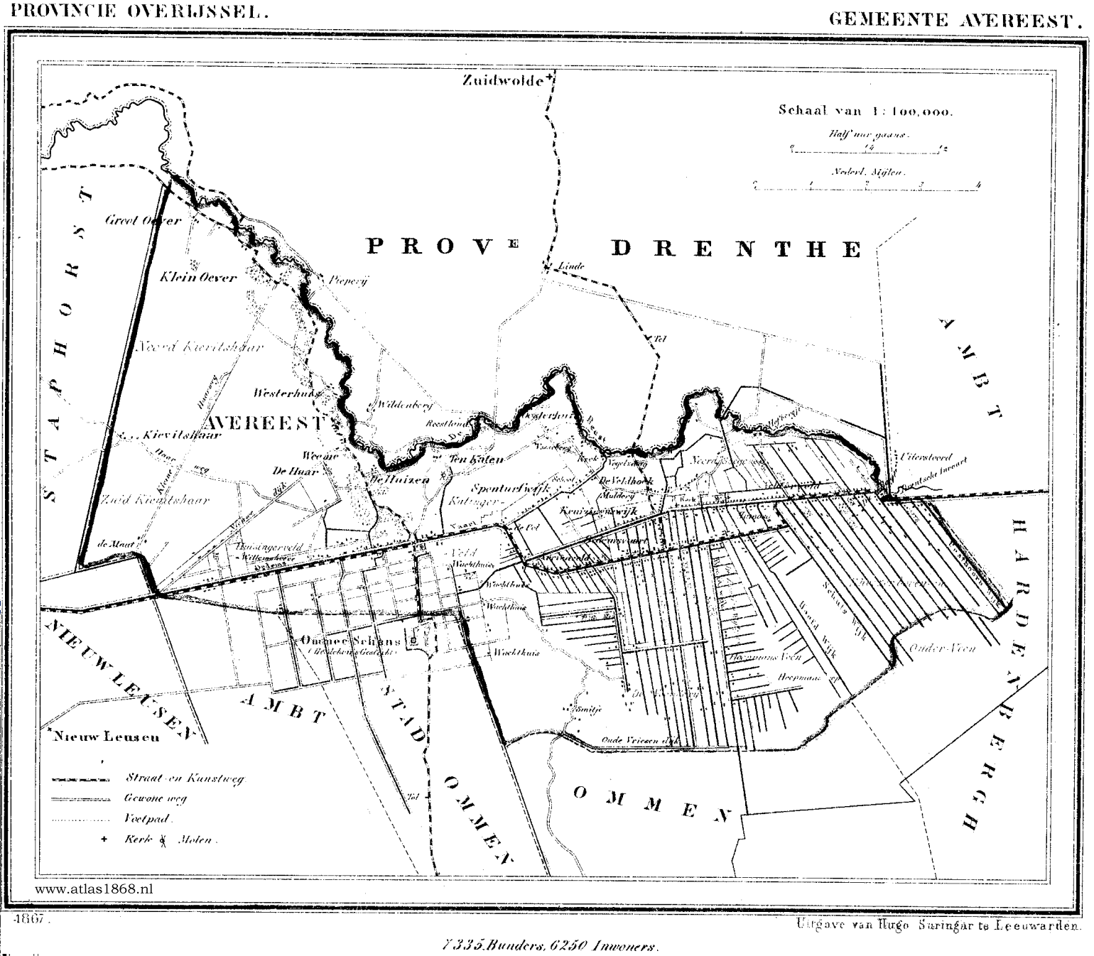 Kaart van Avereest in 1868